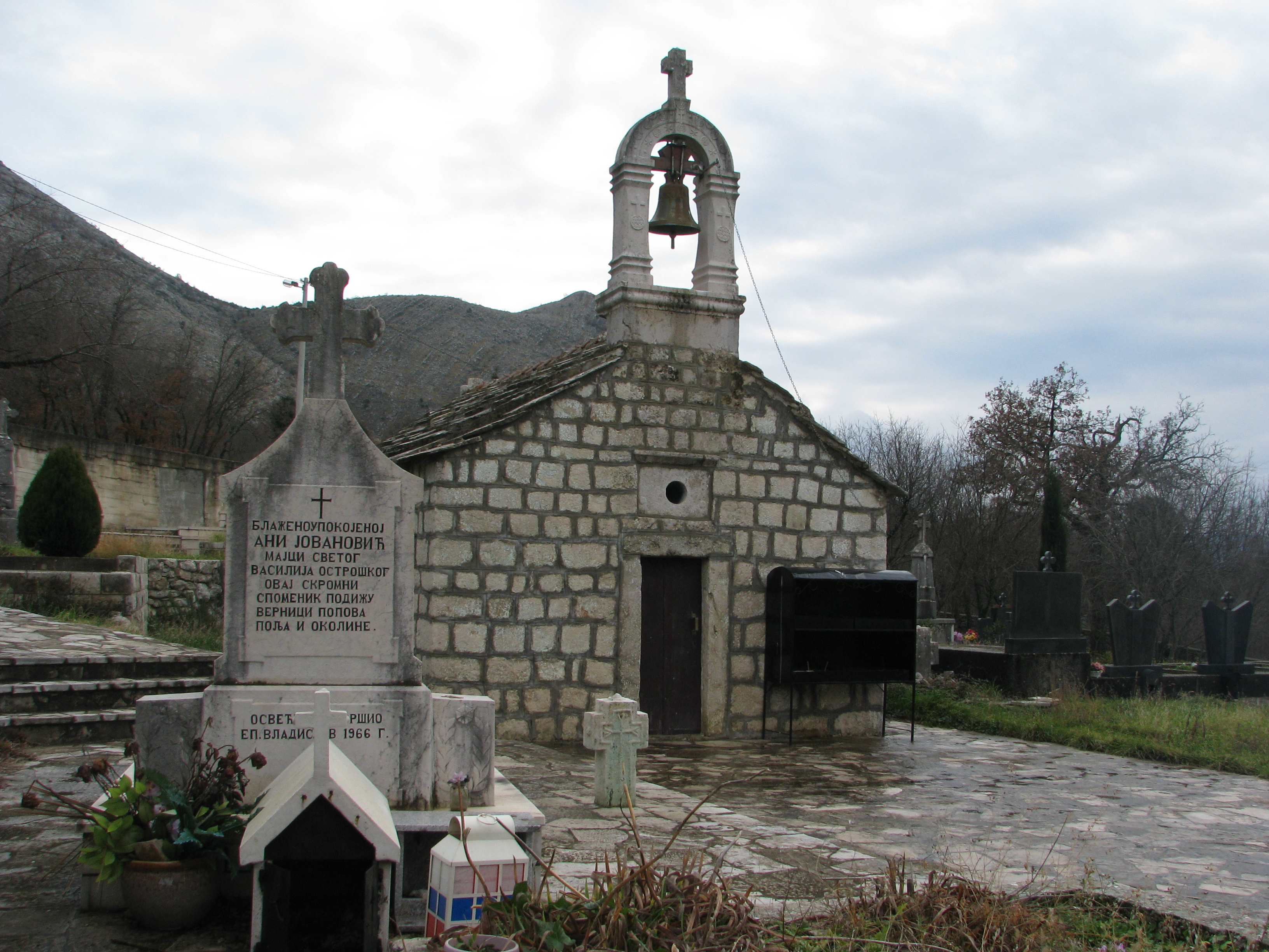 NKD679, Crkva sv. Nikole Mrkonjići (Popovo Polje), u prvom planu se vidi spomenik Ani Jovanović, majci sv. Vasilija Ostroškog i Tvrdoškog